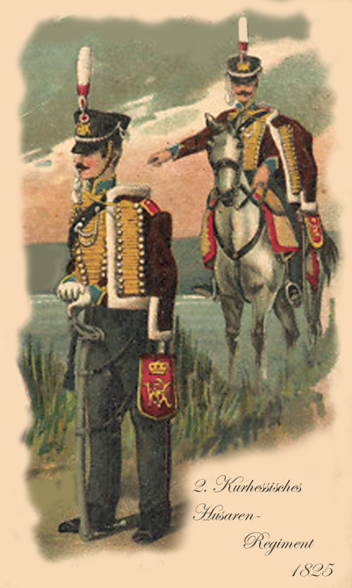 Angehörige des Kurhessischen 2. Husaren-Regiments 1825